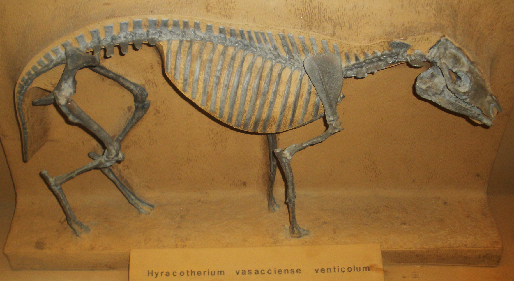 Fossil of Protorohippus venticolum, an extinct mammal- Took the picture at Museo di Paleontologia di Firenze